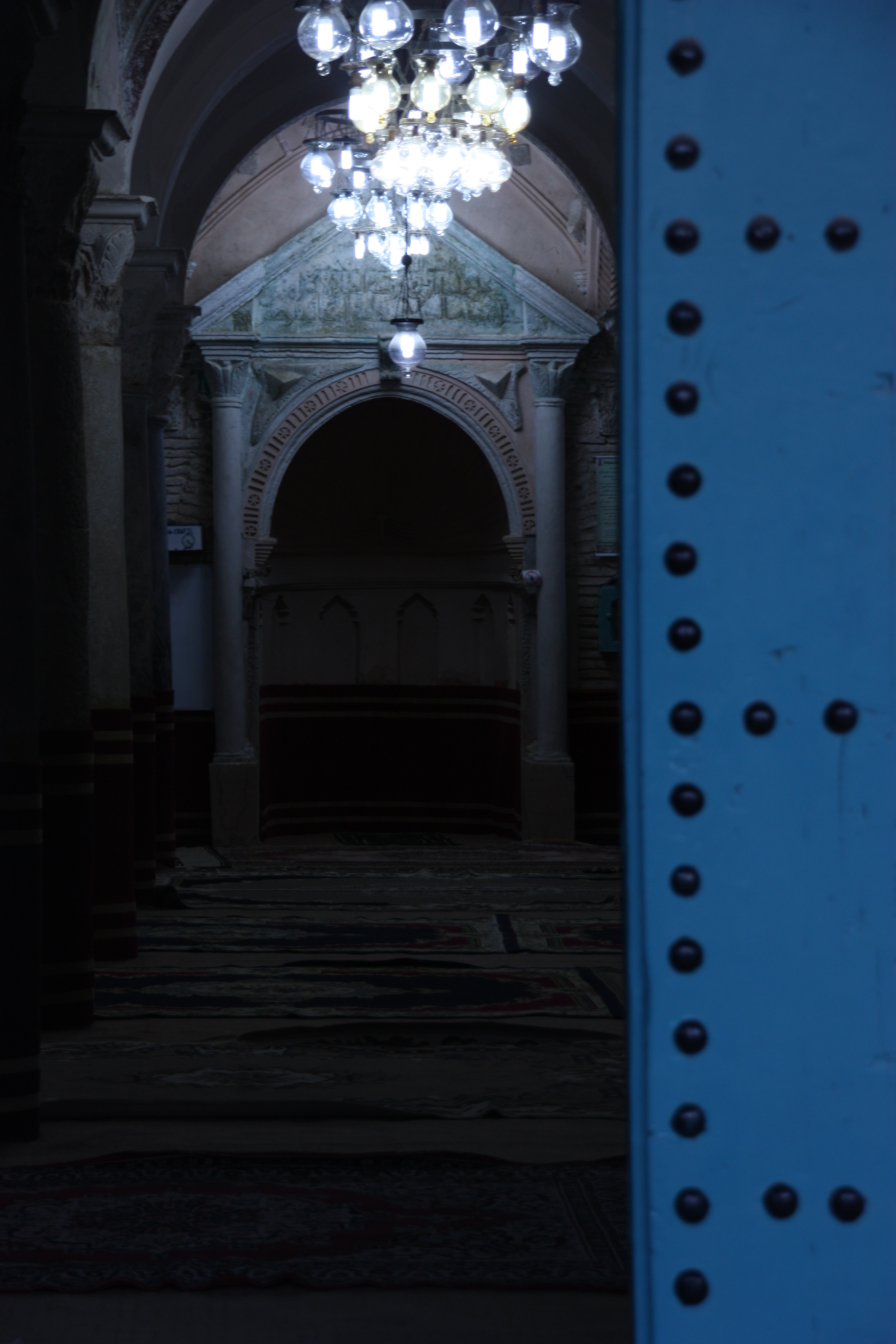 Grande mosquée, Testour